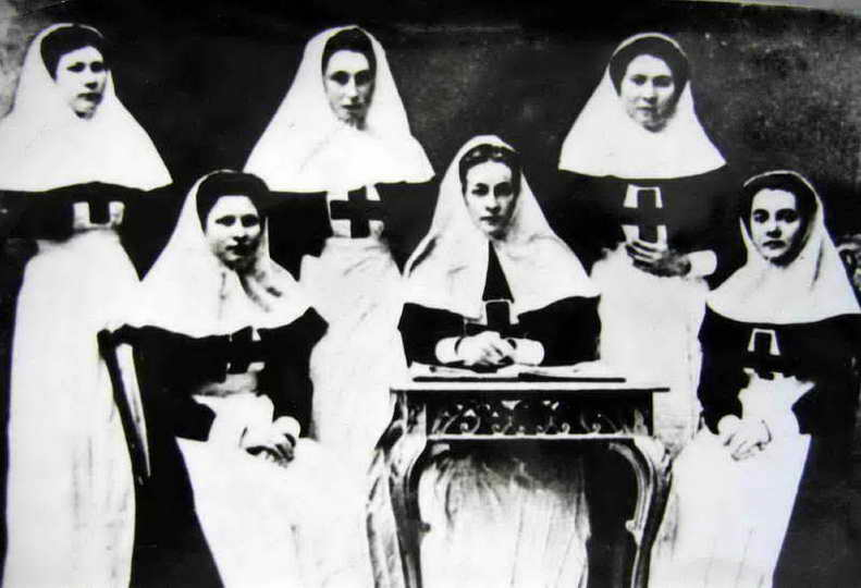 Выпускніцы Цэнтральнай фельчарскай школы 1906 года, г. Магілёў